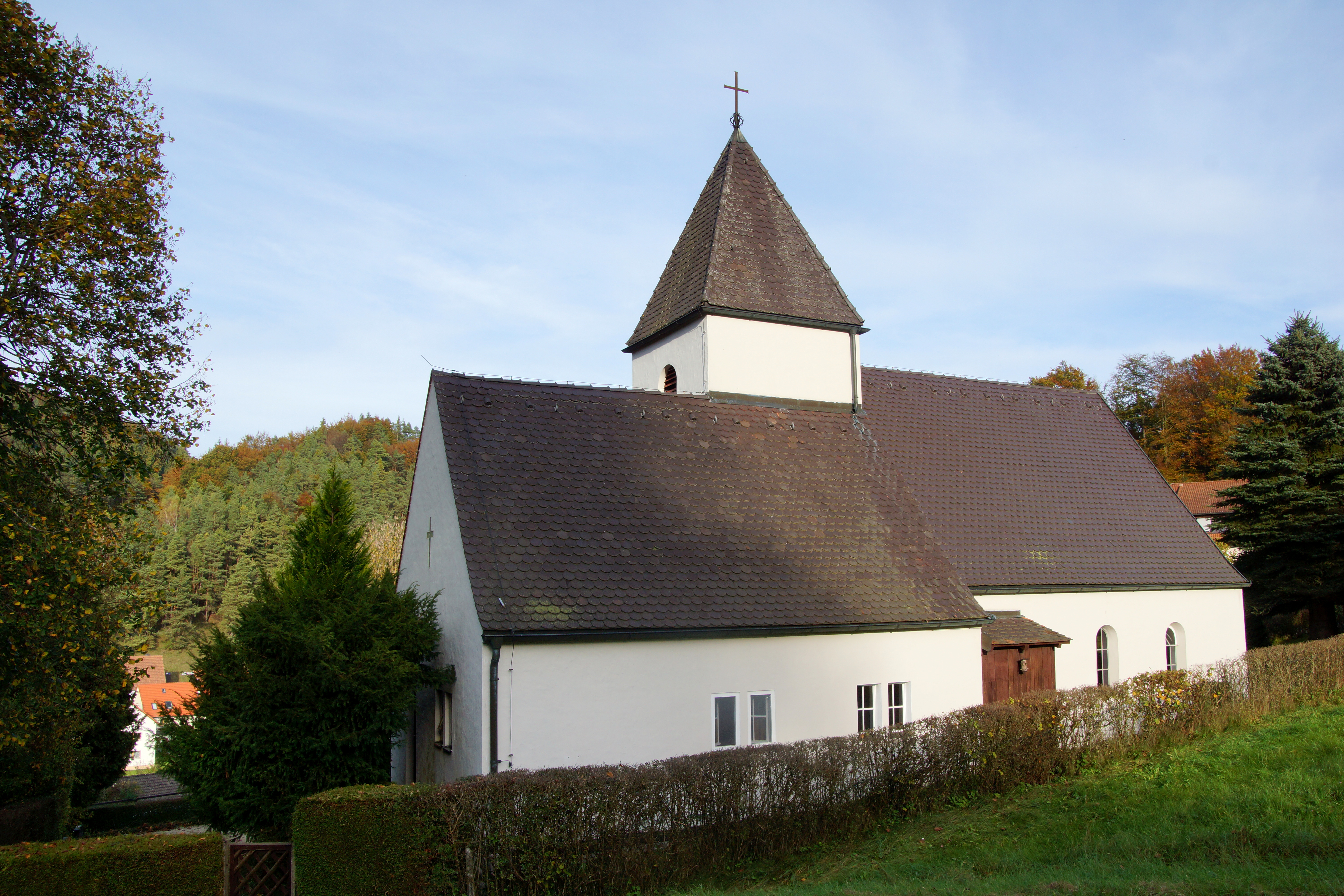 Die evangelische Vikariatskirche St. Johannes (Johanniskirche) in Högen bei Weigendorf